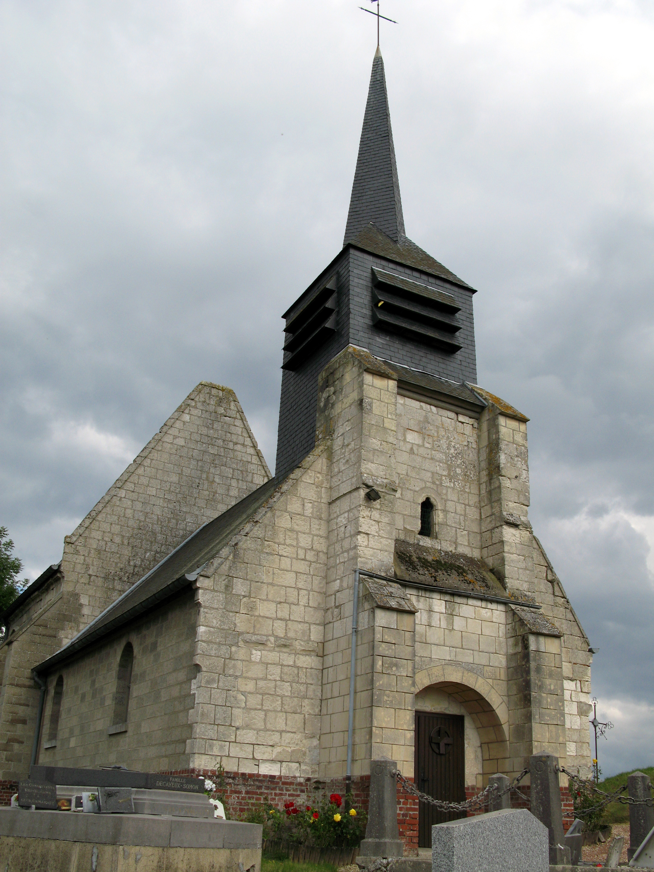 Bettencourt-Rivière (Somme, France) - Eglise de Bettencourt.